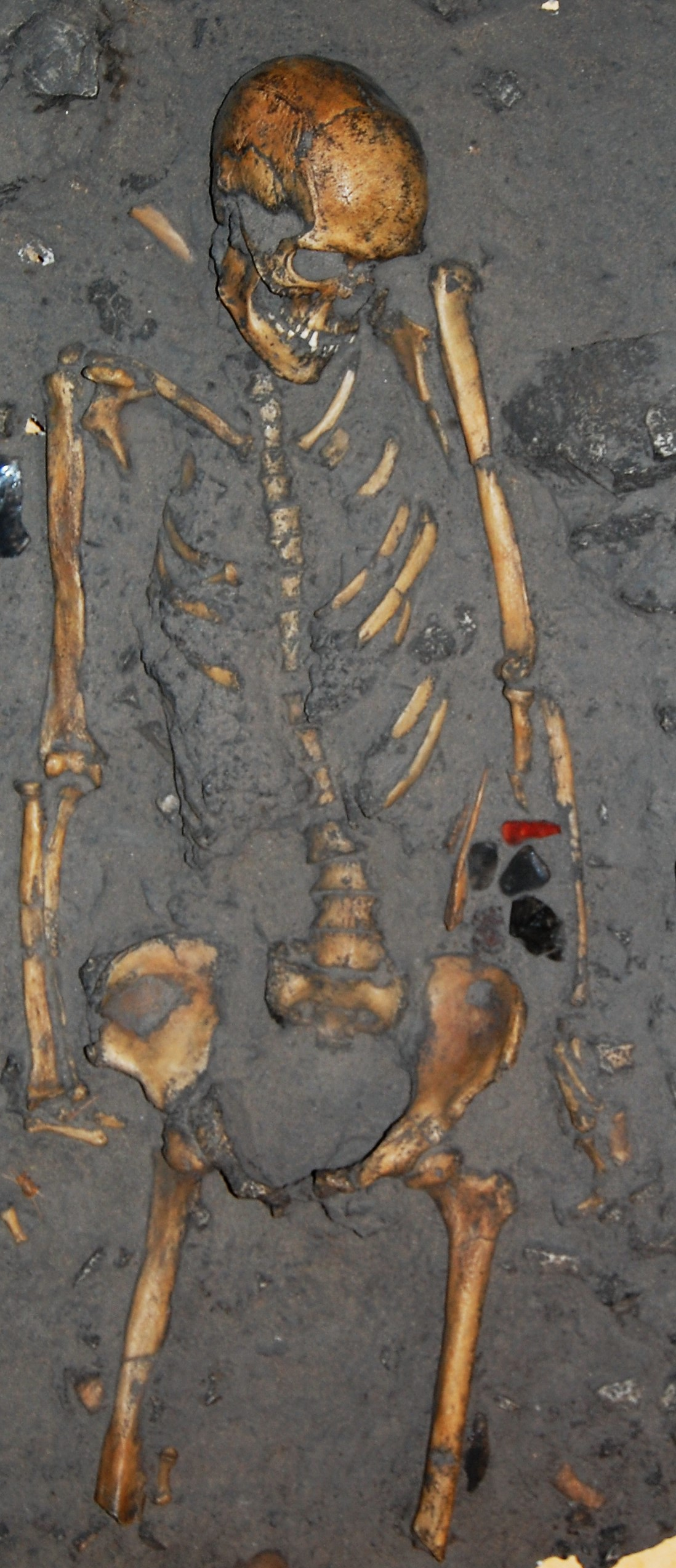 Calco del Cacciatore della Val Rosna